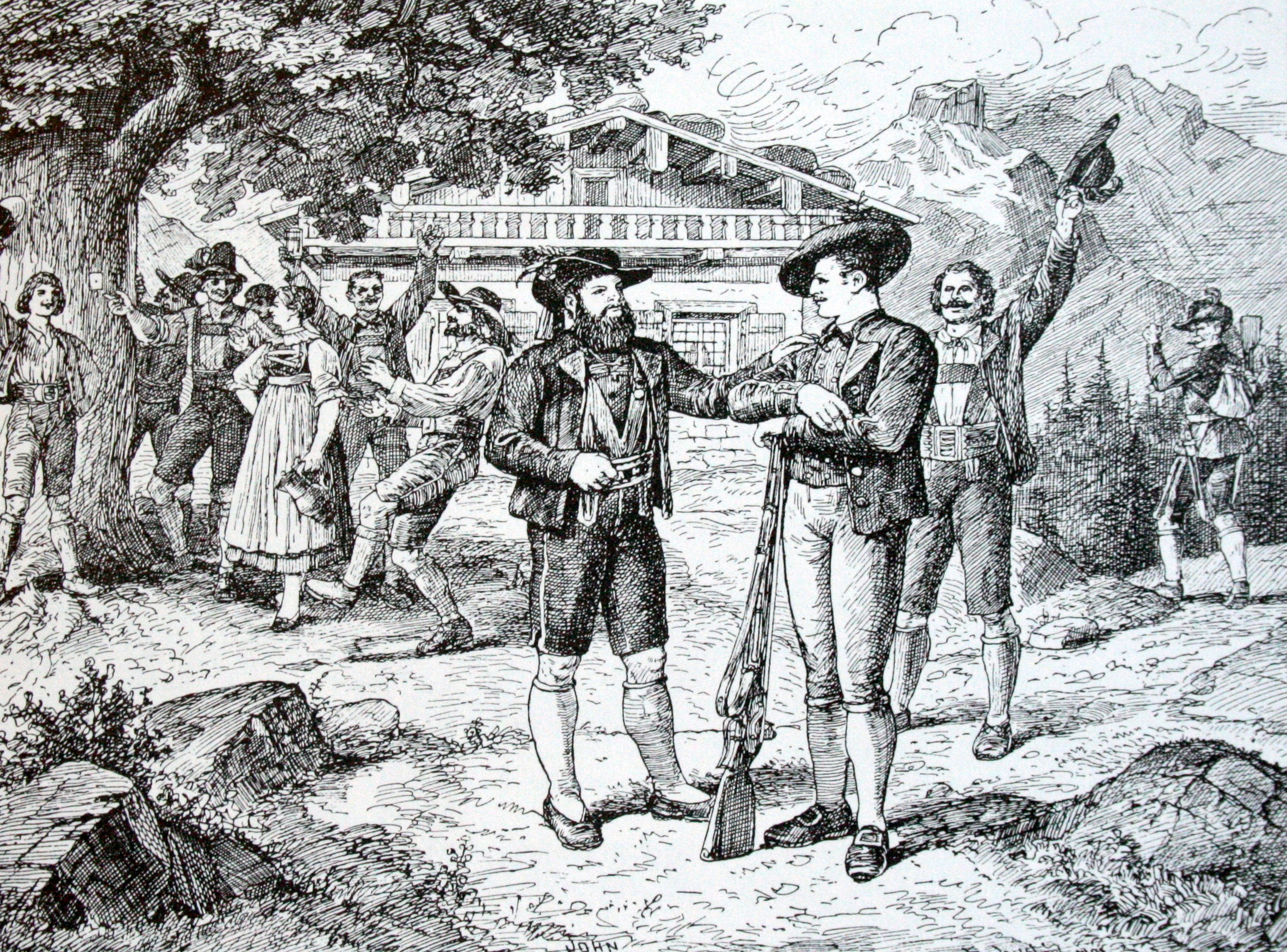 Kalenderillustration für den St. Galler Kalender 1902, S. 51. von Karl Jauslin, Holzstich, 9x13 cm